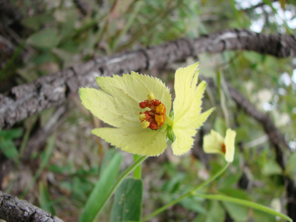 Dalechampia linearis - EUPHORBIACEAE Parque Nacional da Chapada dos Veadeiros - Goias - Brasil.